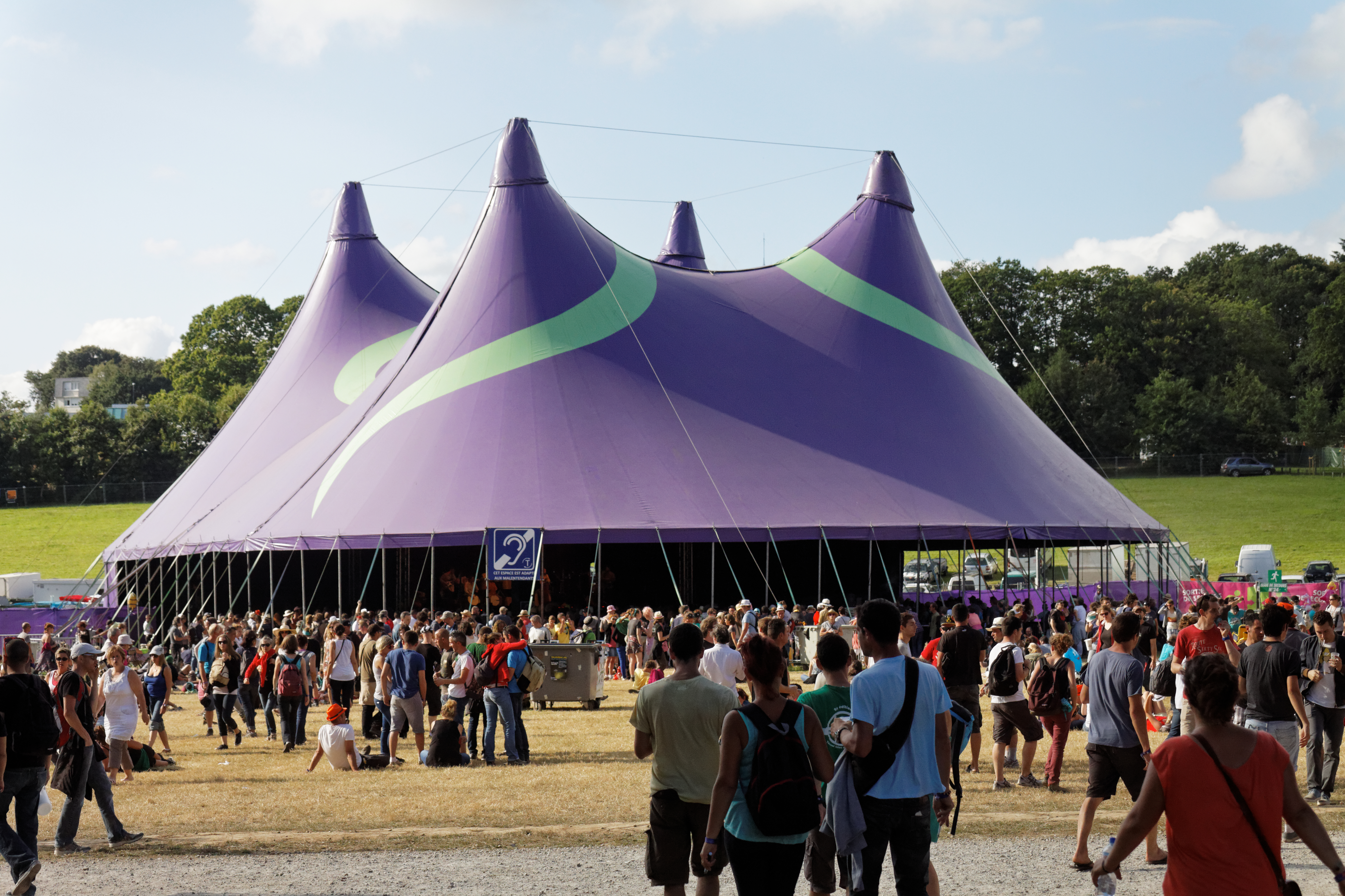 Le festival des Vieilles Charrues 2014.